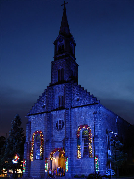 Igreja_São_Pedro Gramado/RS - Brasil